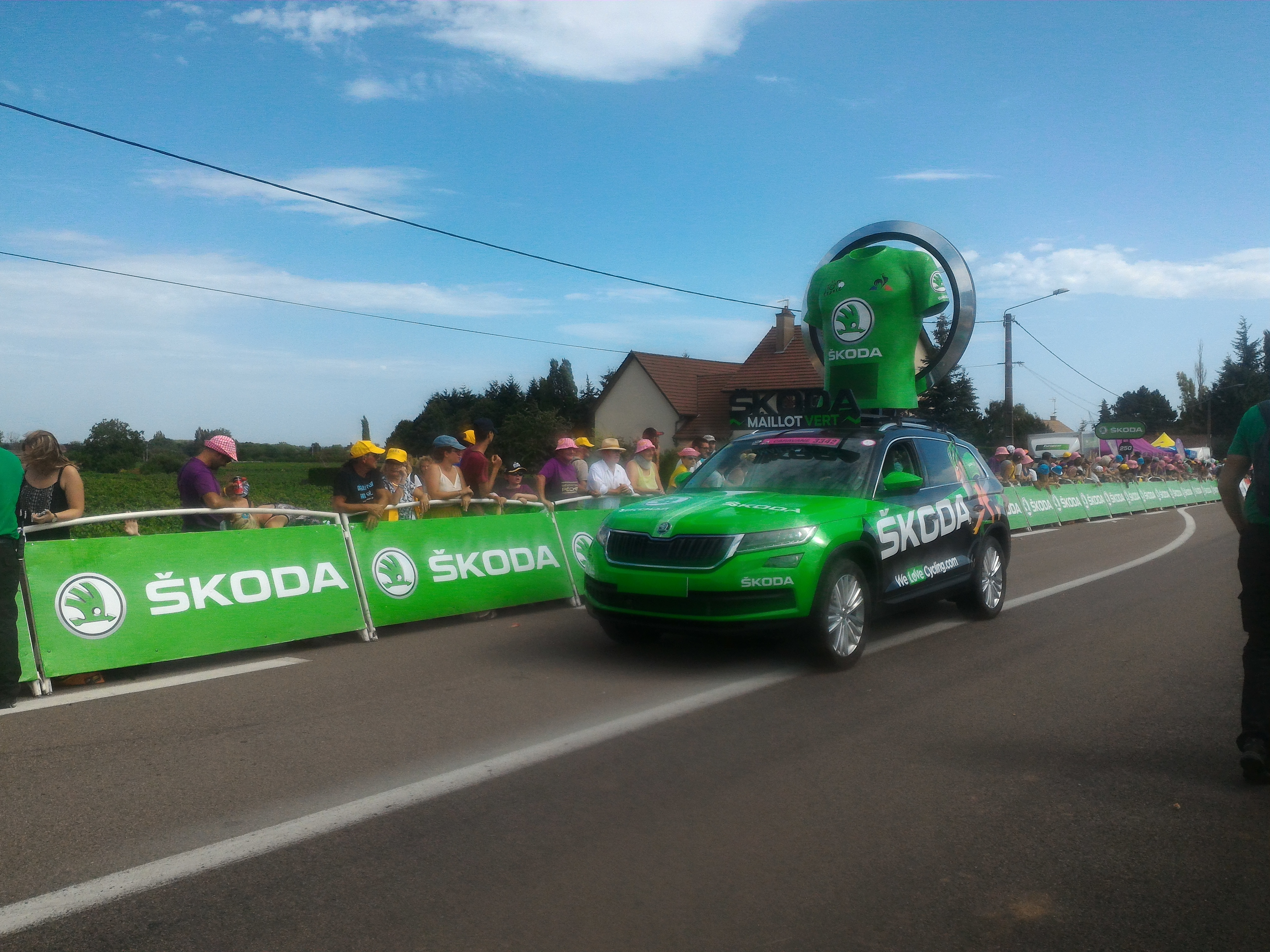 Jpeg